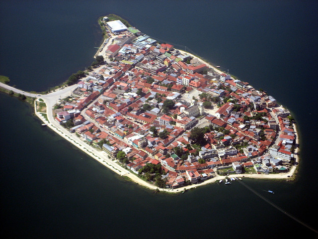 Vista desde el avión rumbo a cancún